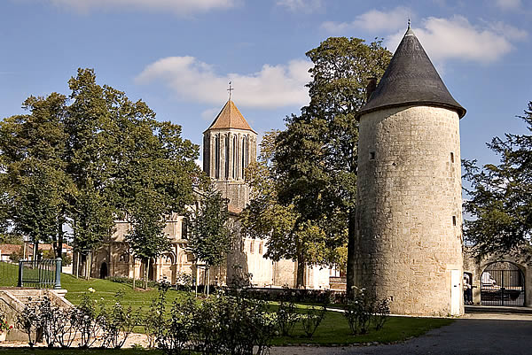 Surgères - Jardins devant la mairie - Charente-Maritime Photo issue de ma banque d'images : Pep.per 15 octobre 2006 à 19:43 (CEST)